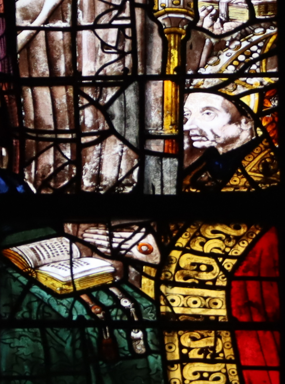 Baie 111 de la cathédrale Saint-Maurice d'Angers (49). Registre médian. Détail. L'évêque Jean Michel.